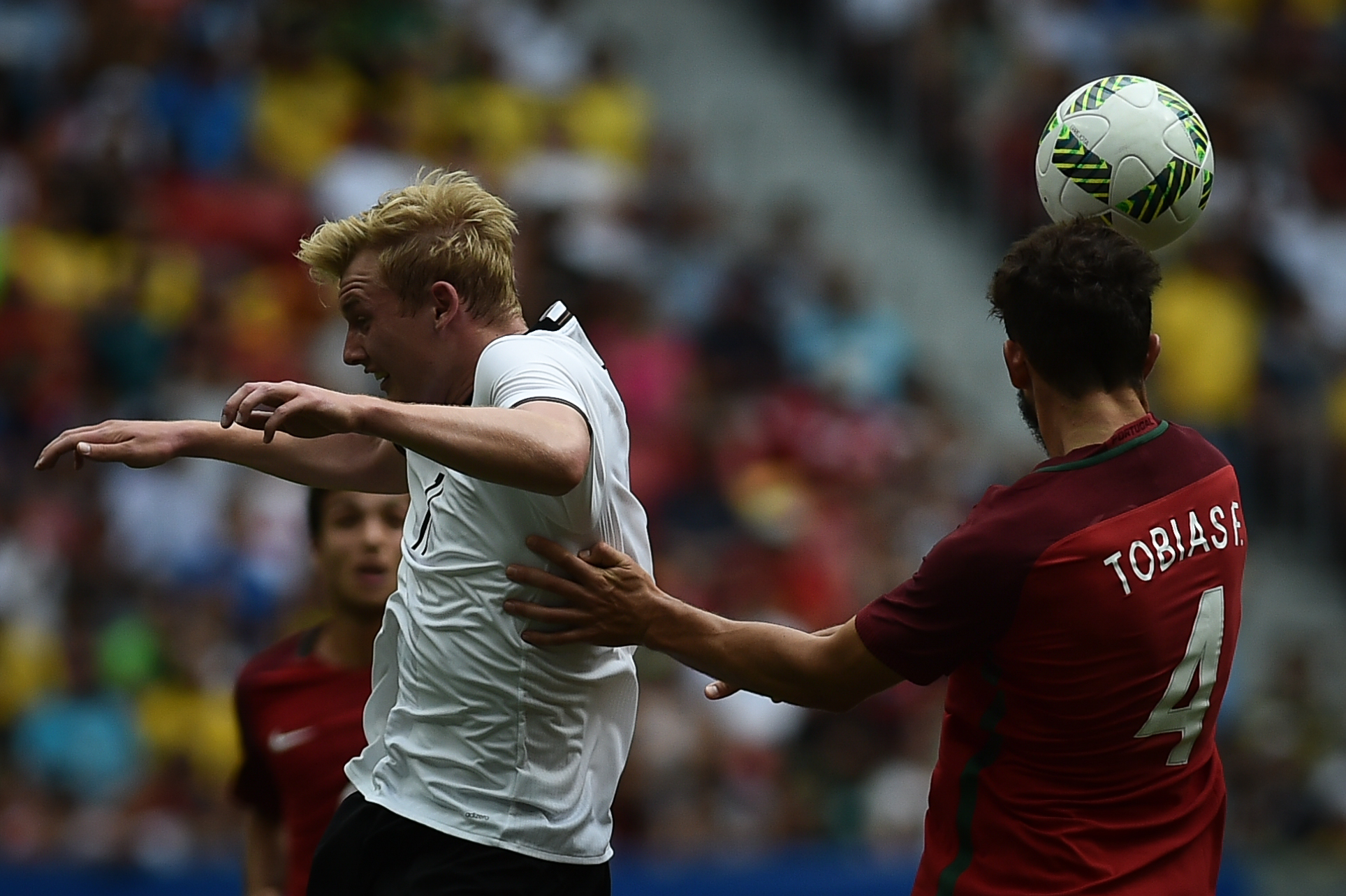 Estádio Nacional de Brasília Mané Garrincha, Brasília, DF, Brasil, 13/8/2016 Foto: Andre Borges/Agência Brasília Portigal e Alemanha jogam neste sábado (12), no Estádio Mané Garrincha, pelas quartas de final do futebol masculino nas Olimpíadas 2016.